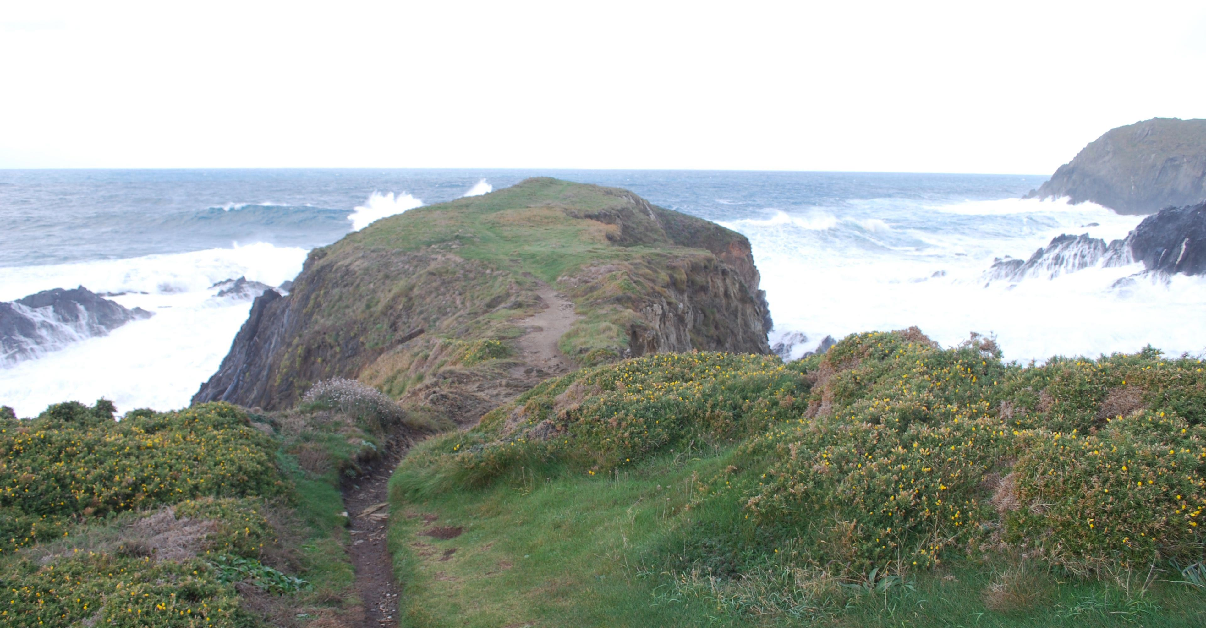 Castro de Punta do Bico, Valdoviño A Coruña Galiza